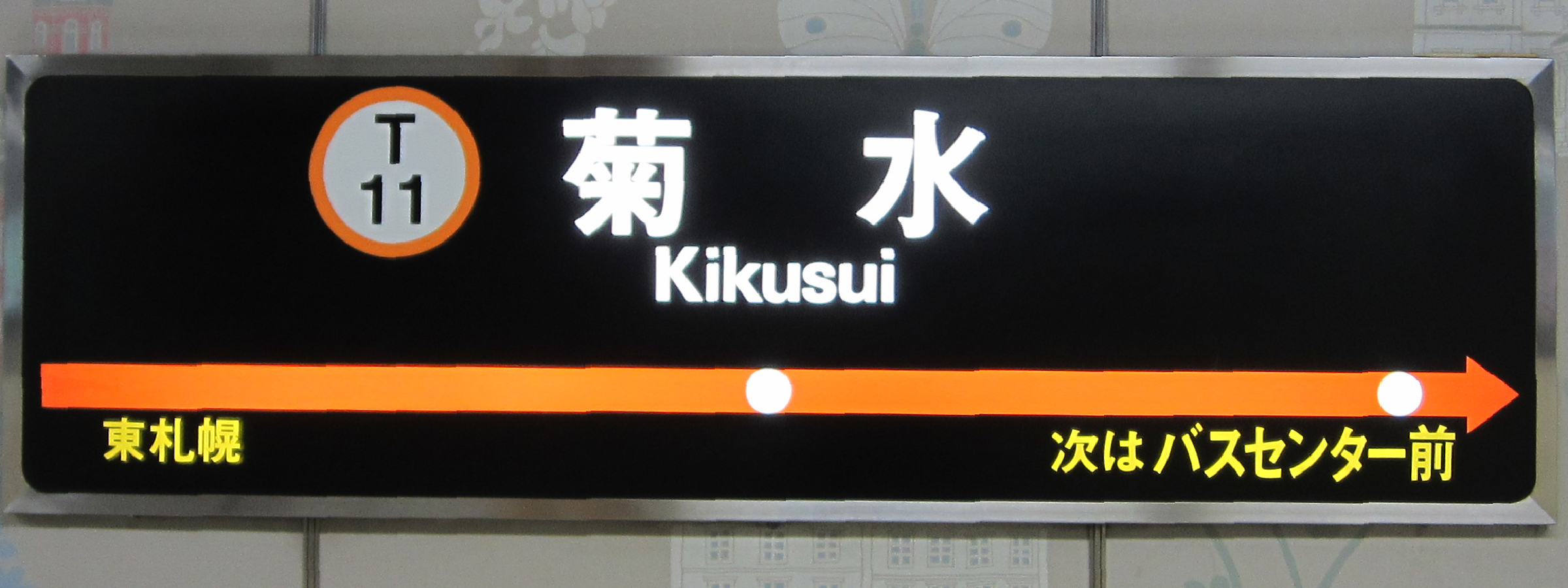 札幌市営地下鉄東西線菊水駅駅名標（大通・宮の沢方面）